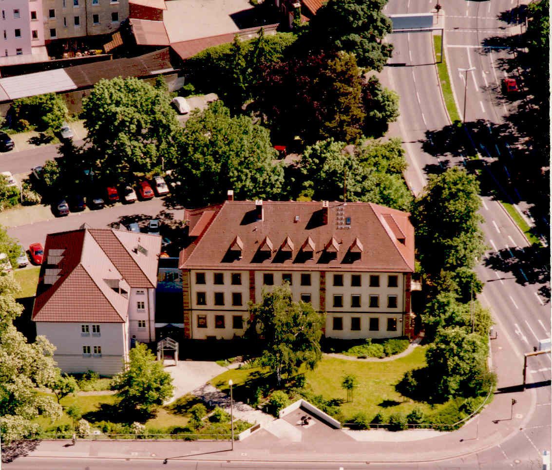 Gebäude des Wasser- und Schifffahrtsamtes Schweinfurt